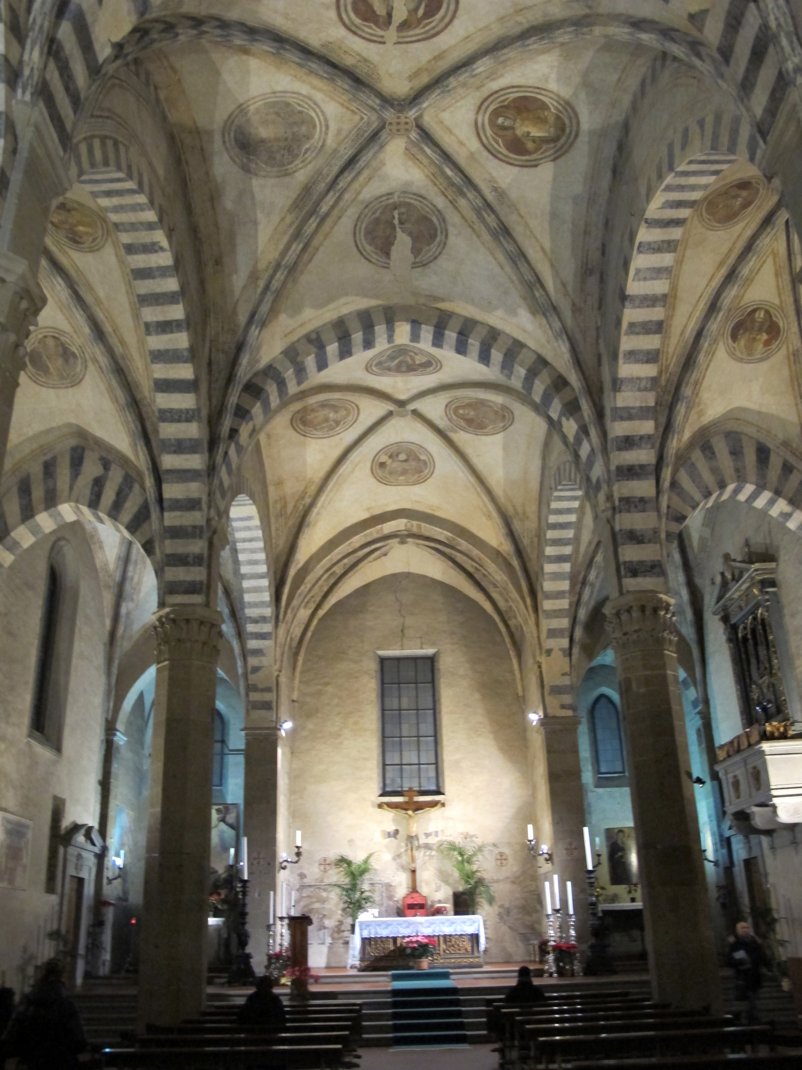 San remigio, fi, interno